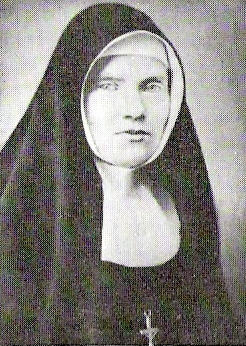 M. Anselma Bopp (Gründerin und erste Generaloberinn der Franziskanerinnen in Thuine, gest. 1887).